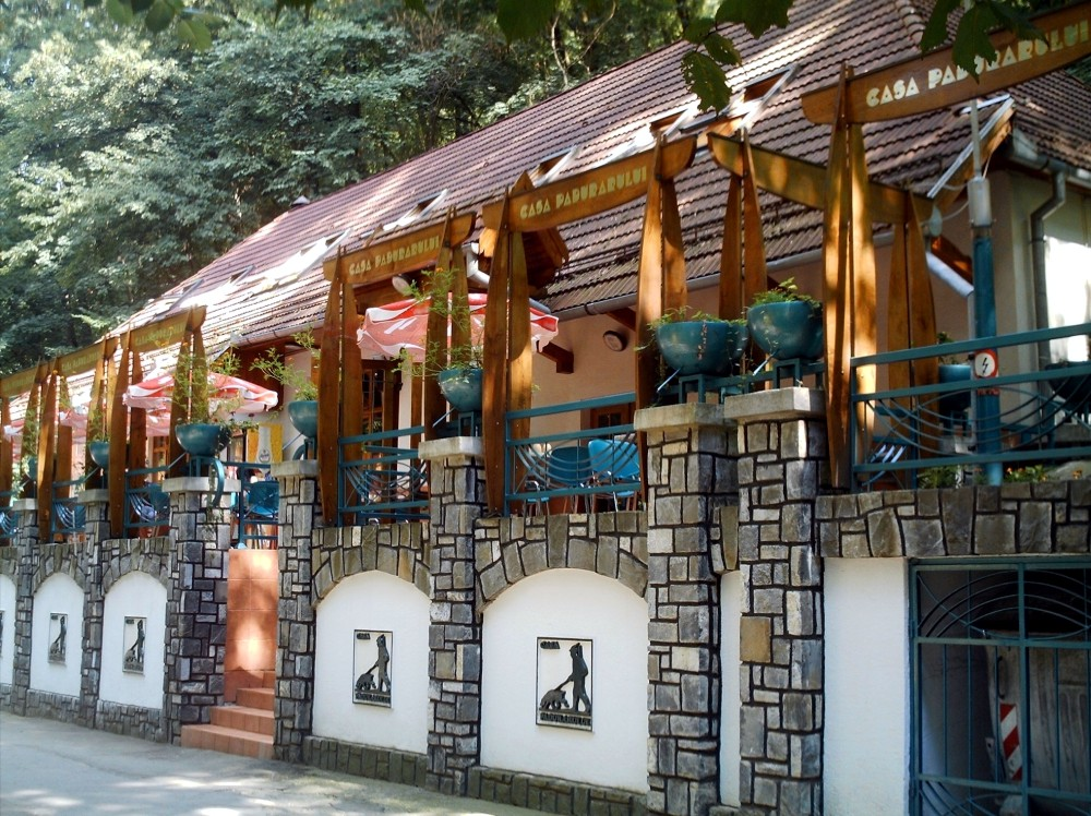 Cabana-restaurant Casa Pǎdurarului Brasov